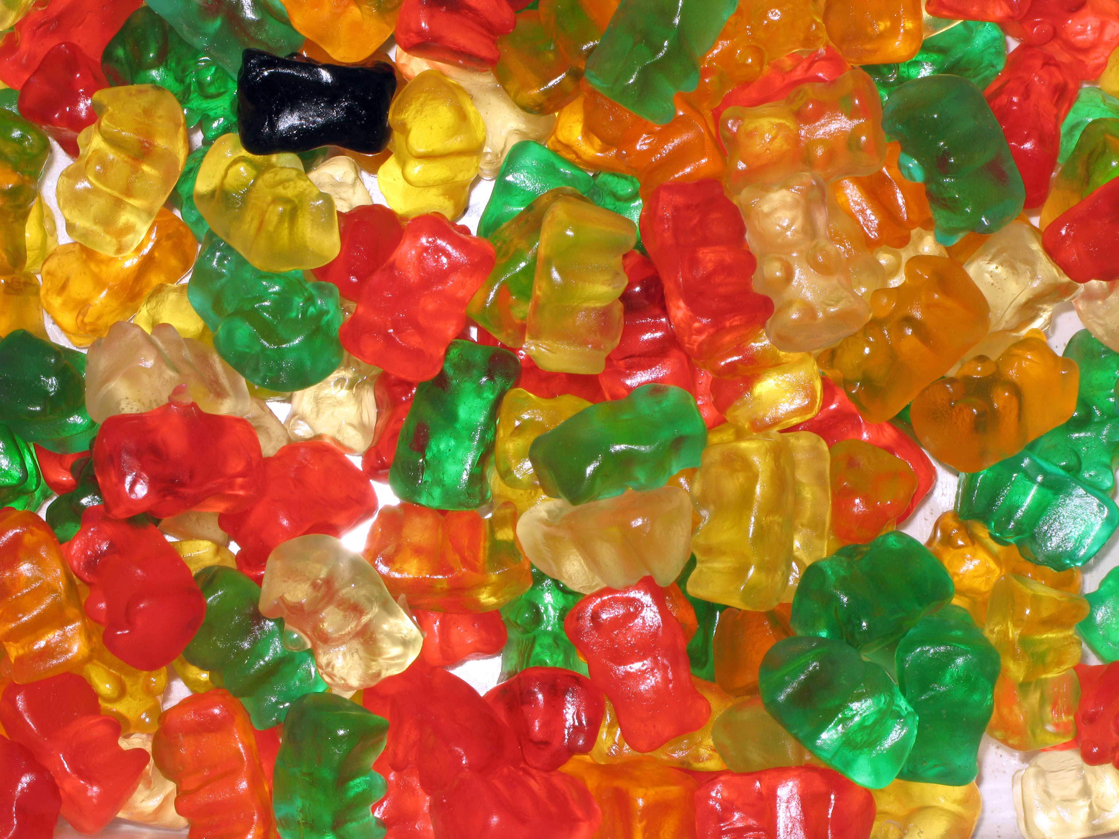 Gummibieren.